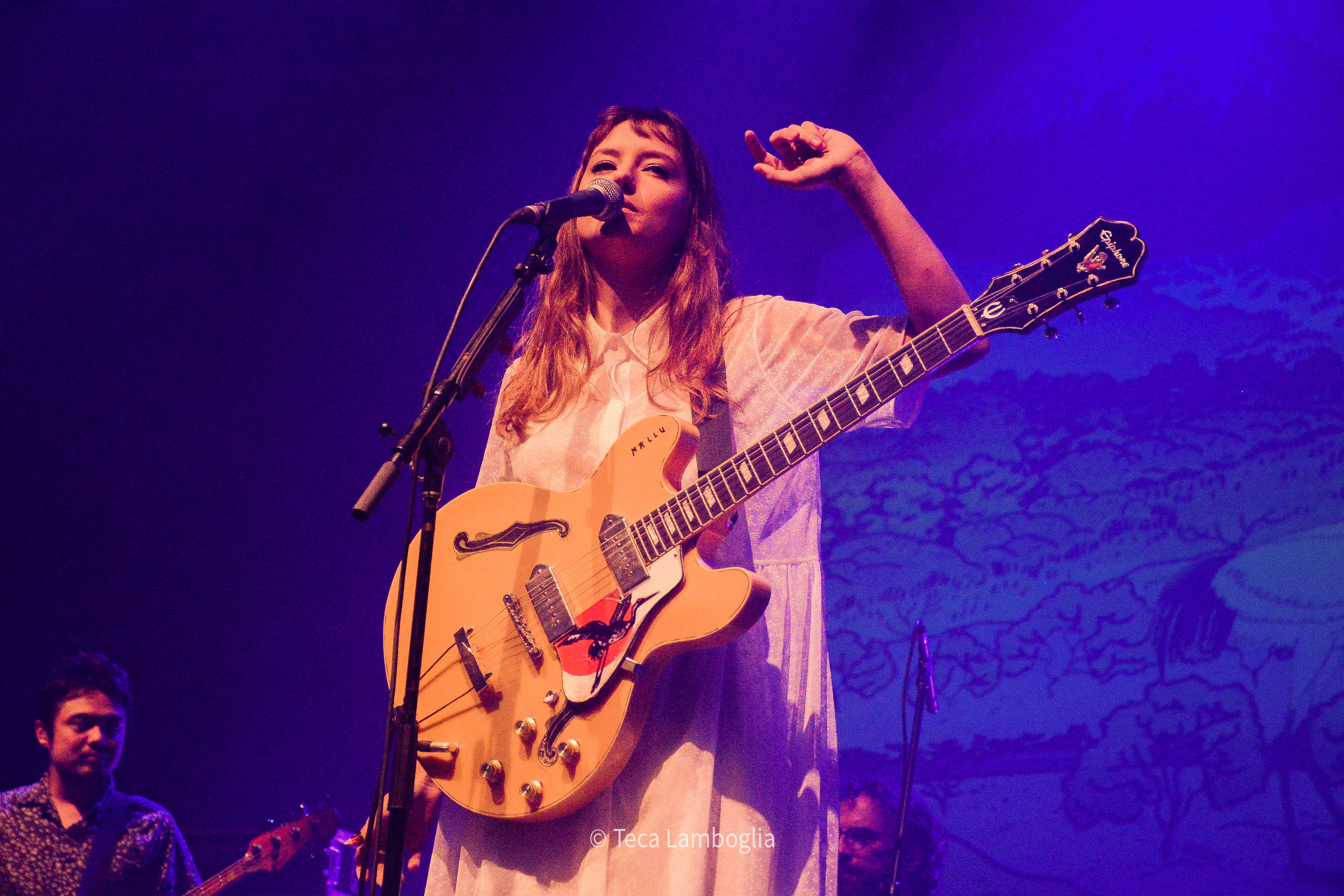 Magalhães em 2018